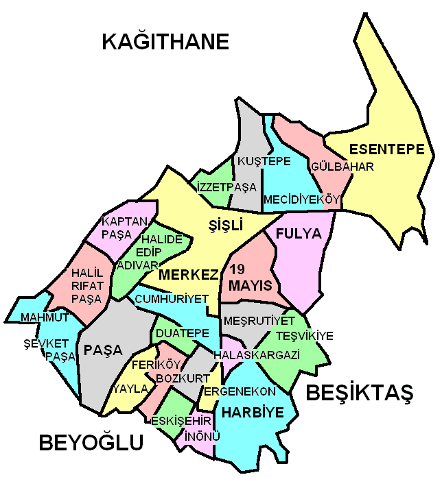 A map of neighbourhoods of Şişli.